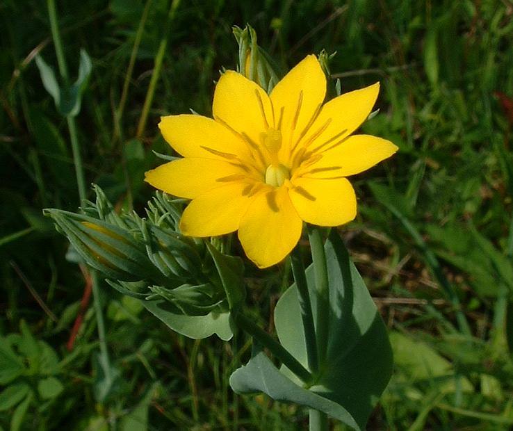 Blackstonie perfoliée Blackstonia perfoliata subsp. perfoliata, photo J. F. Gaffard, Bucey-lès-Gy, juin 2004.